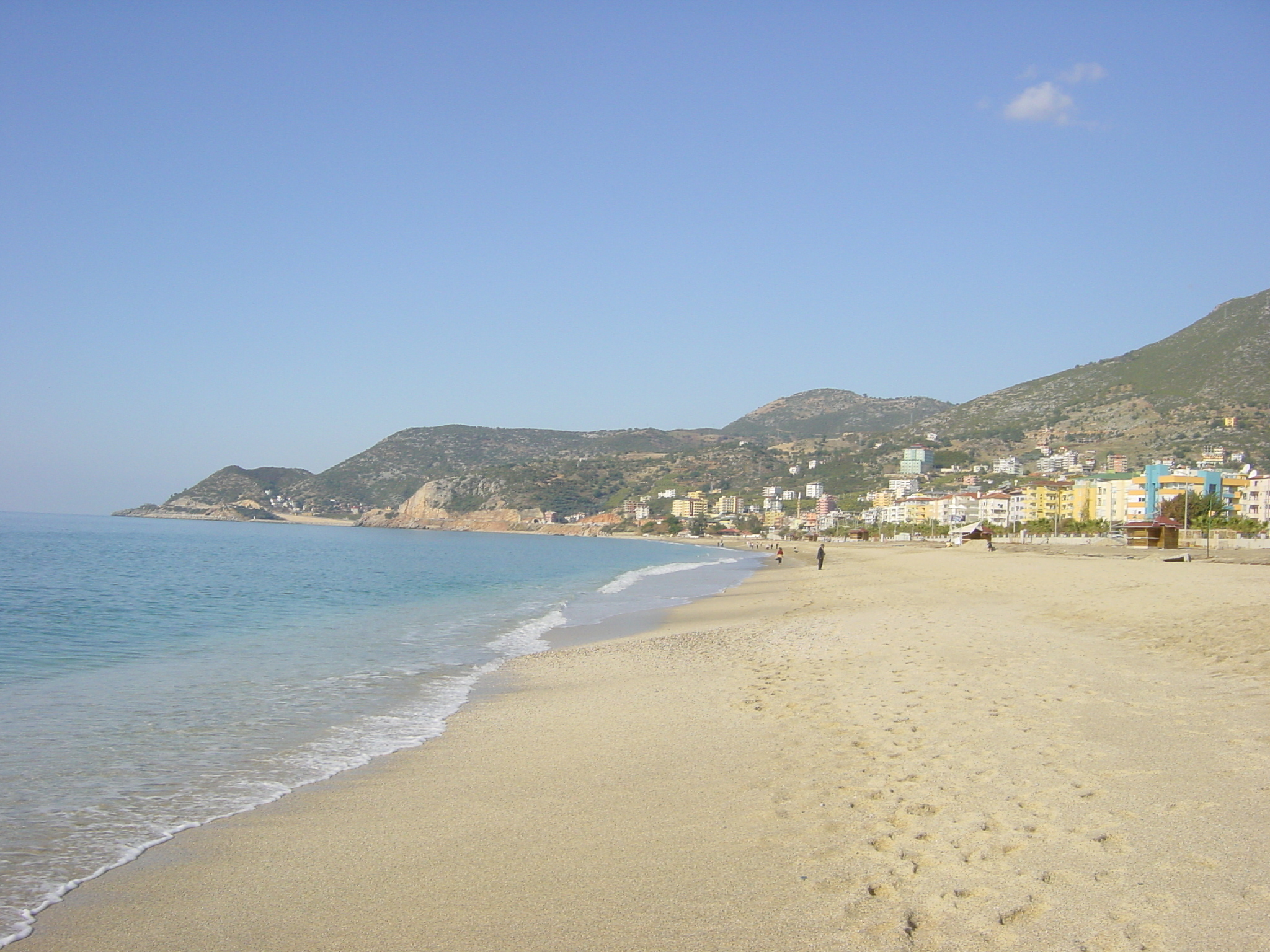 2003-12-28 01-04 T�rkei 008 Alanya